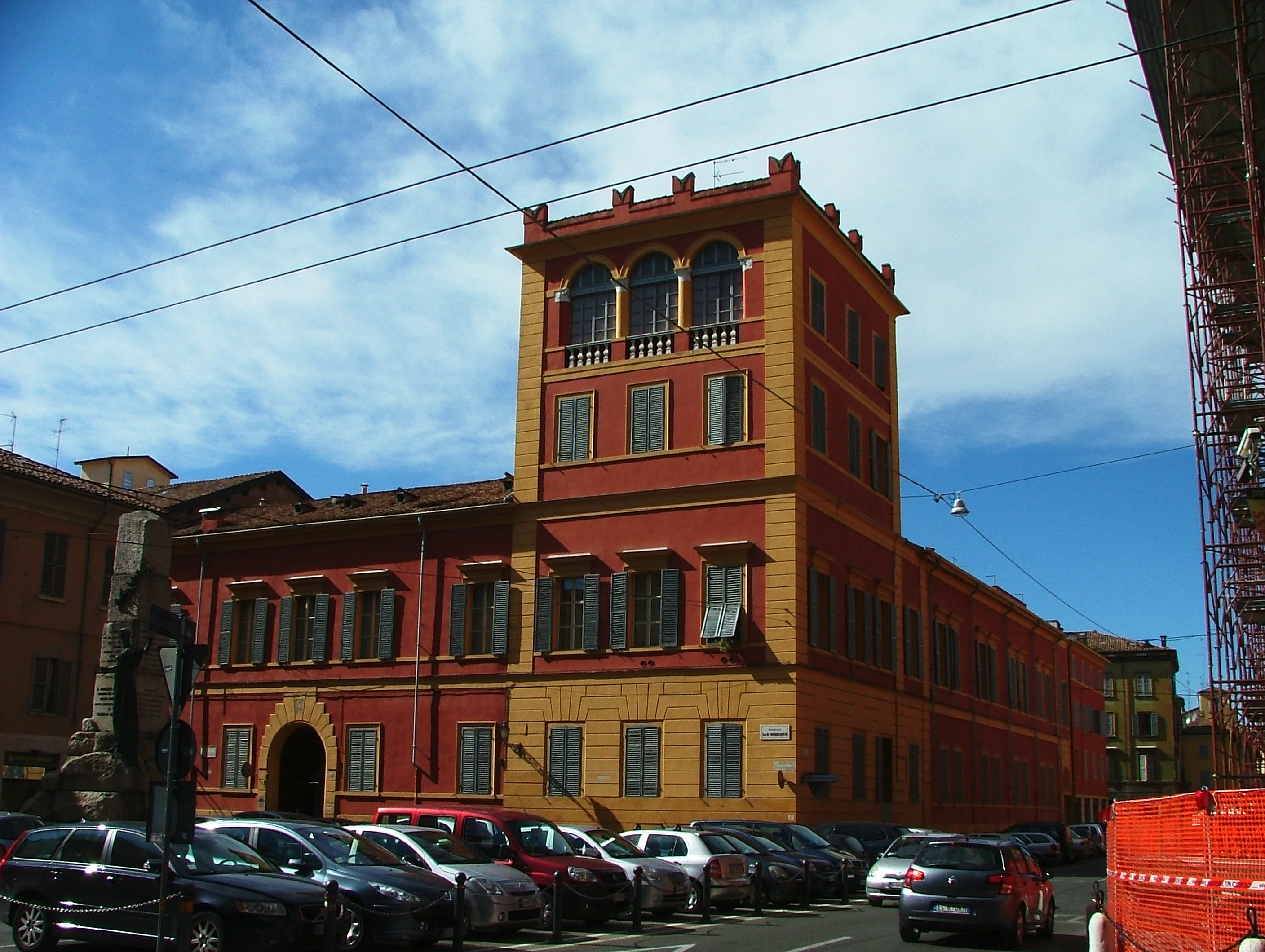 Già palazzo Rangoni, poi Marsciano, e in seguito Tacoli a Modena